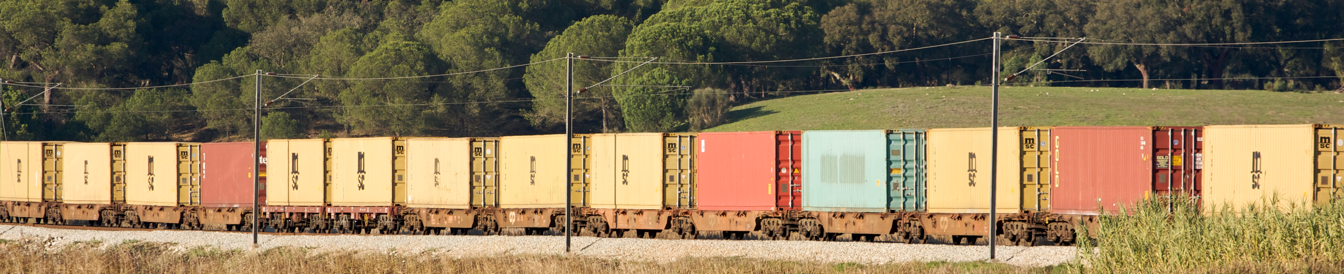 Tipo: Vagões articulados (transporte de contentores e caixas móveis) Local: Alcácer do Sal [Linha do Sul, PK 76] Data e hora: 10 de Dezembro de 2009 [15h25] Material: CP Sggmrss [série 496 1] composição do Comboio de Transporte de Contentores 81381 [Bobadela - Sines].